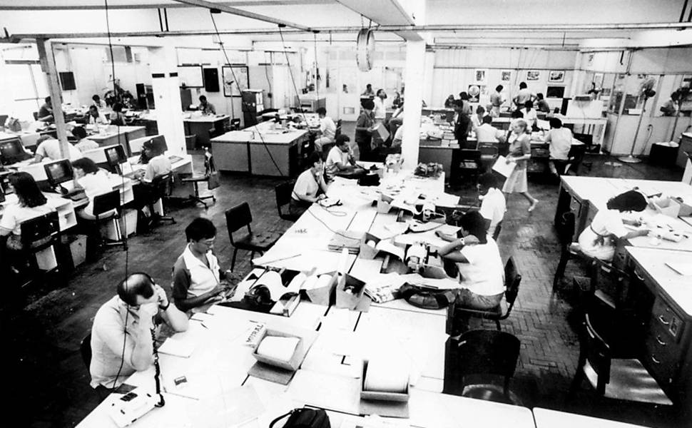 Jornalistas na Redação em 1986, ano em que a Folha institui, na cobertura da Copa do Mundo, o uso de estatísticas e da imparcialidade no jornalismo esportivo